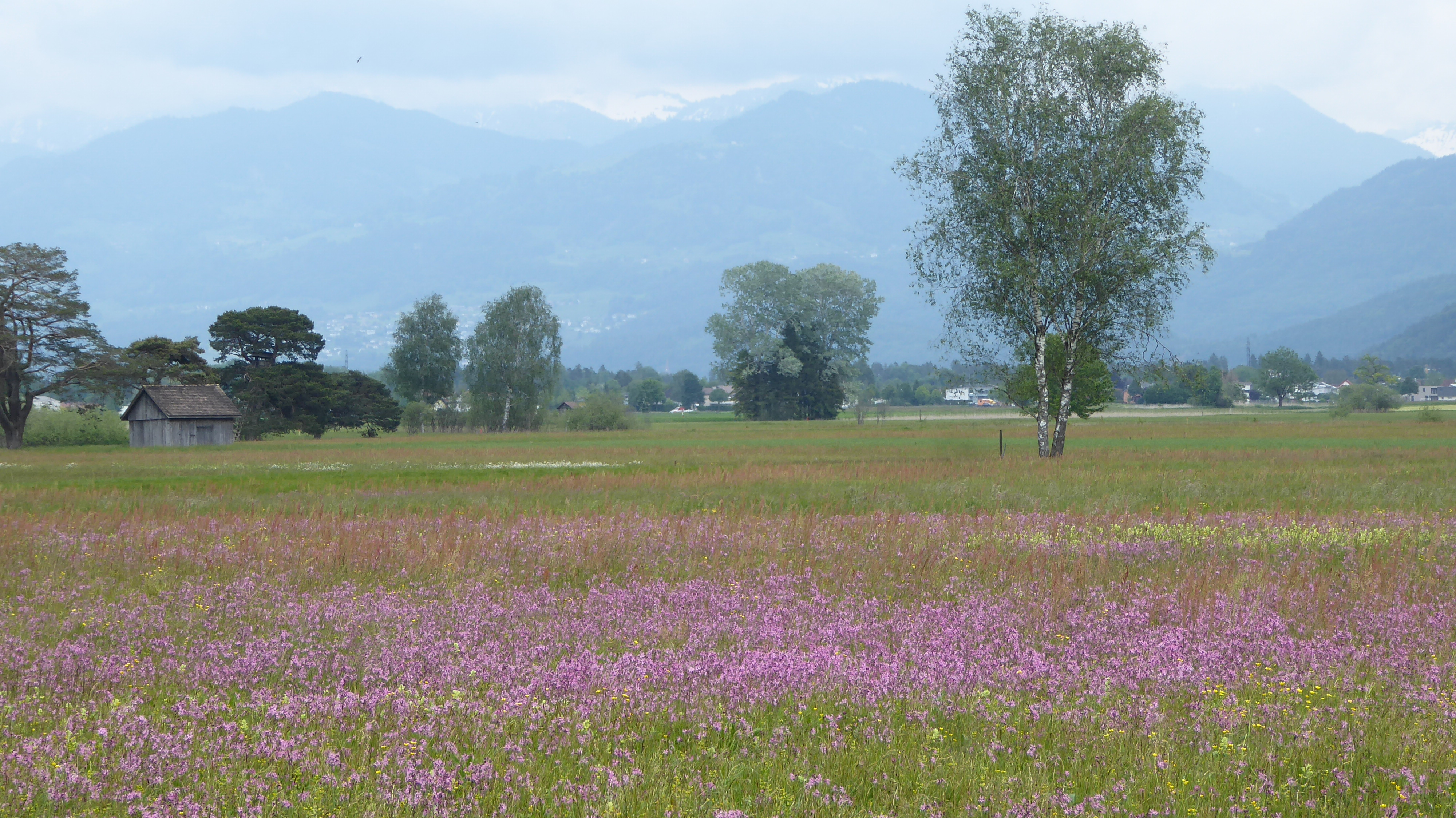 Ruggeler Riet mit … im Vordergrund